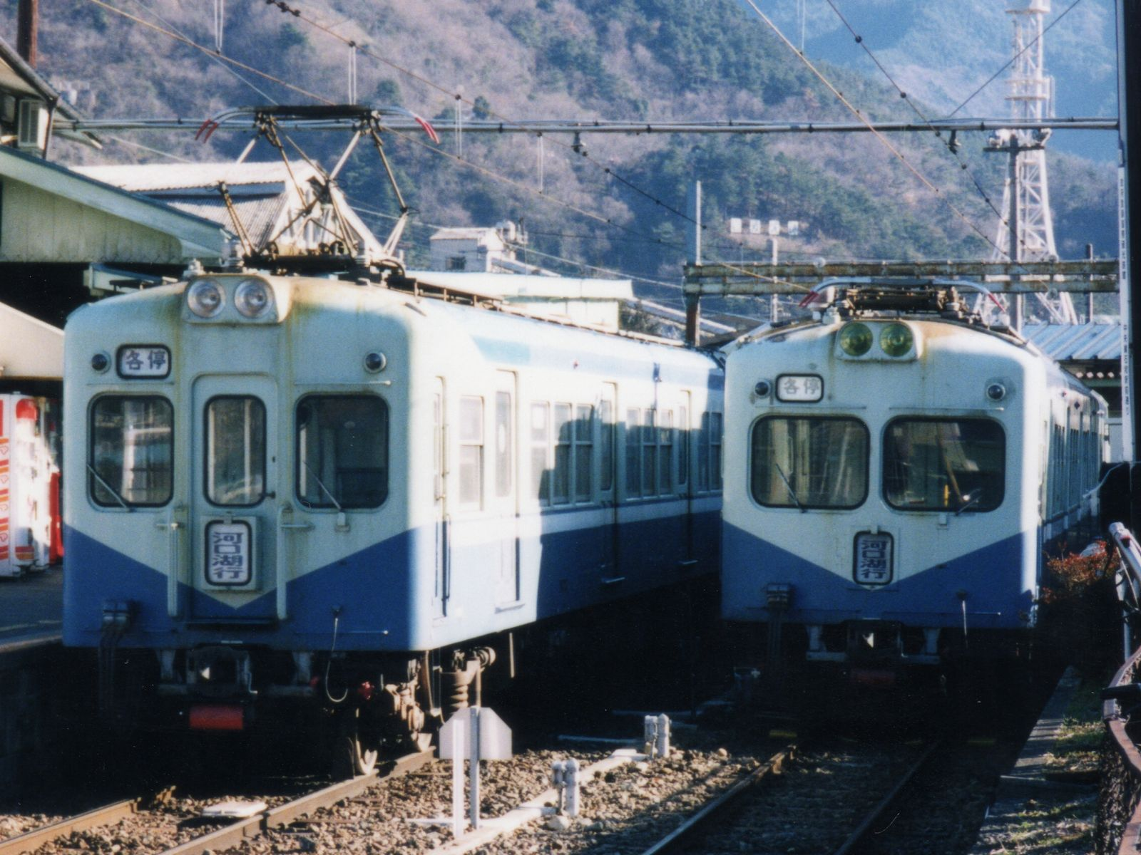 Fujikyuko Co., EMU type 5700 (Right)from Odakyu 2200 (Left)from Odakyu 2220 at Otsuki Sta.